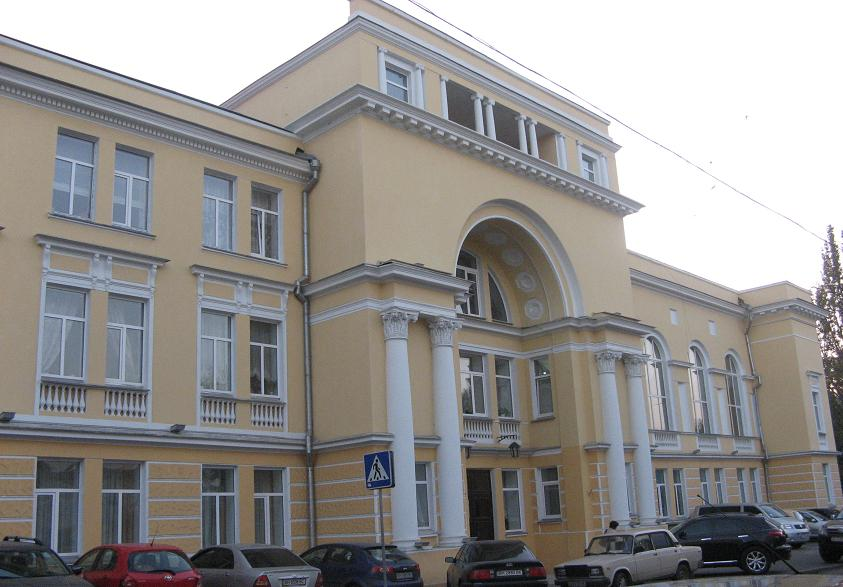 Фотография известной одесской музыкальной школы им. П.С.Столярского